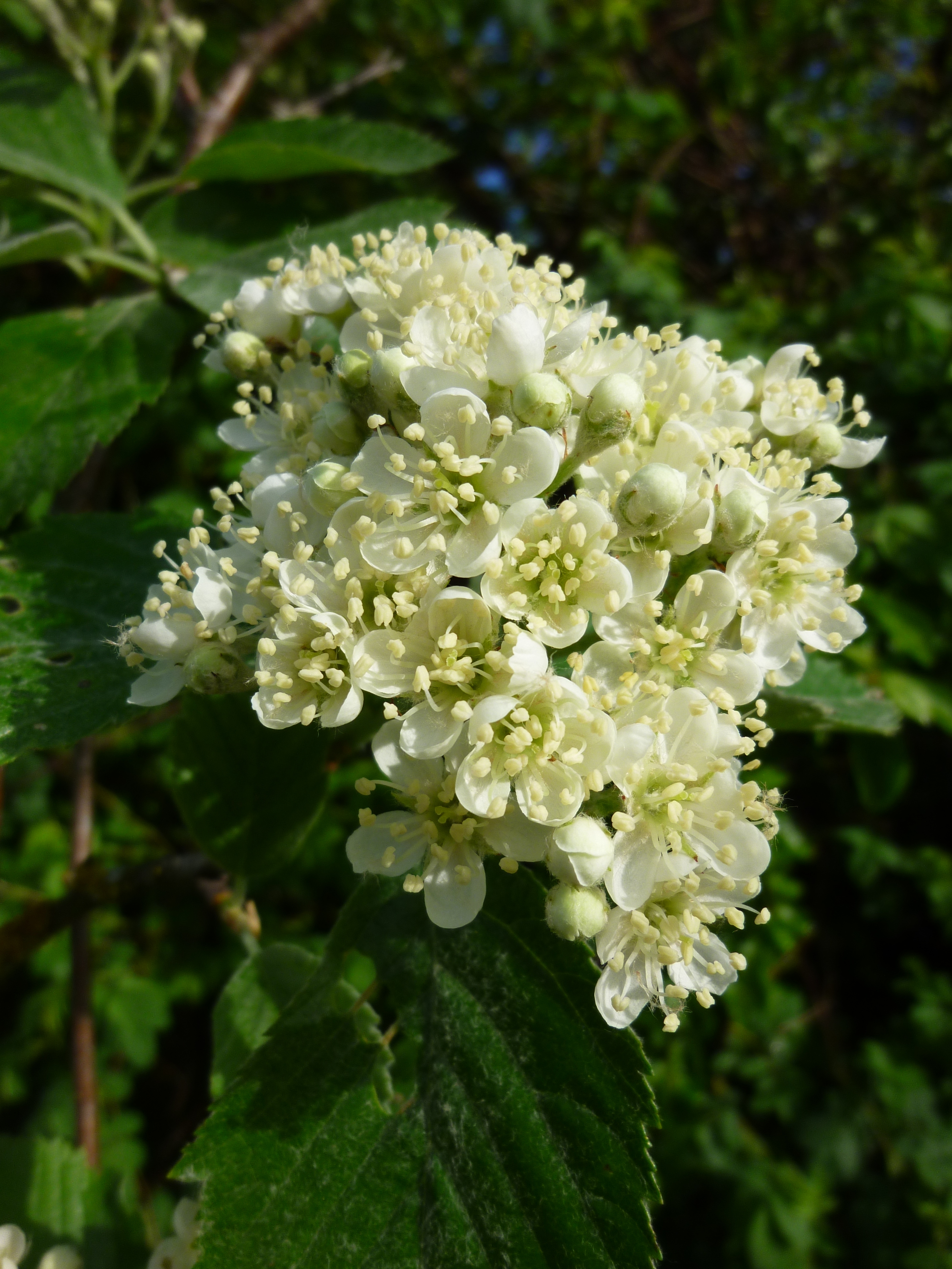 Sorbus meyeri Blüte, Külsheim-Eiersheim, Heistenberg 15.05.2013